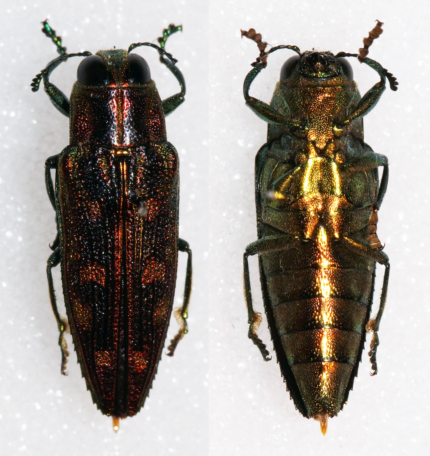 Fairmaire,1891 Sex: Male Data: 04-2014 - Mt Kloto - Togo Size: 12mm